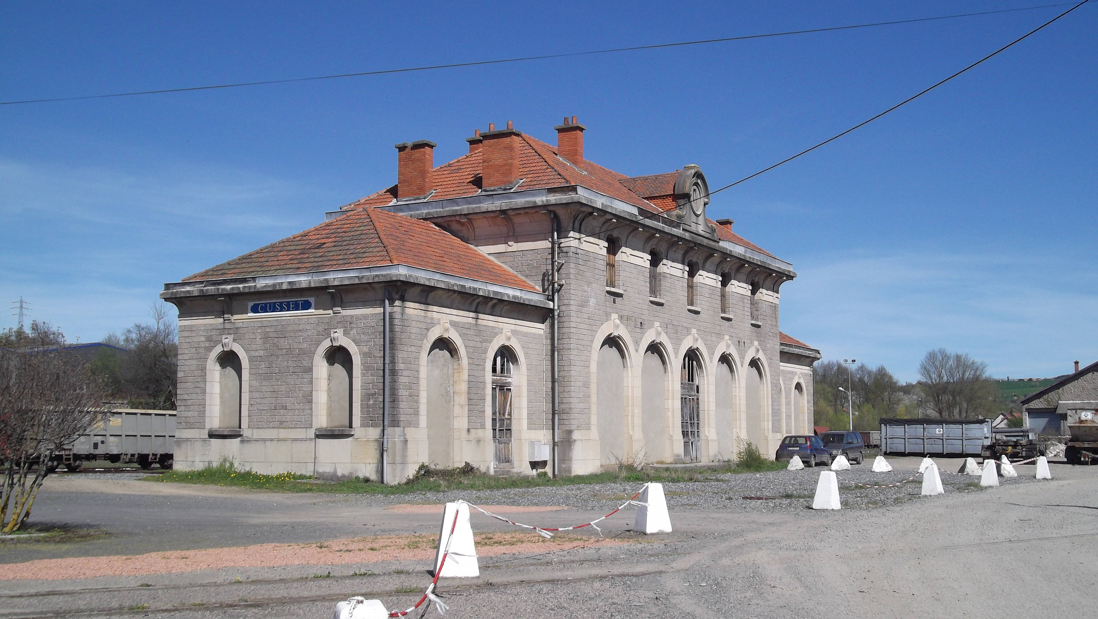 Ancienne gare de Cusset.